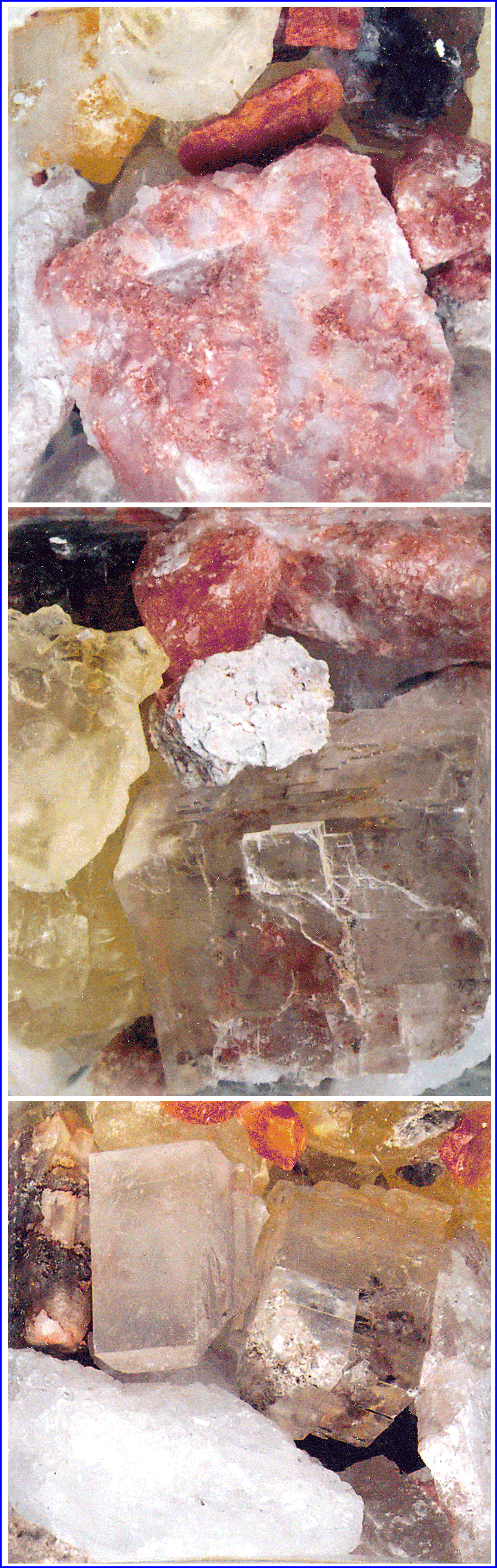 Salzproben aus dem Kali- und Steinsalzbergwerk Conow (hier u.a. zu sehen: Hartsalz, Kainit, Sylvin, Carnallitit und Steinsalz), abfotographiert aus einem Schauglas, welches Herr Diplomgeologe Rolf Löser dem Bergamt Stralsund schenkte anläßlich des 20-jährigen Bestehens des Bergamtes.